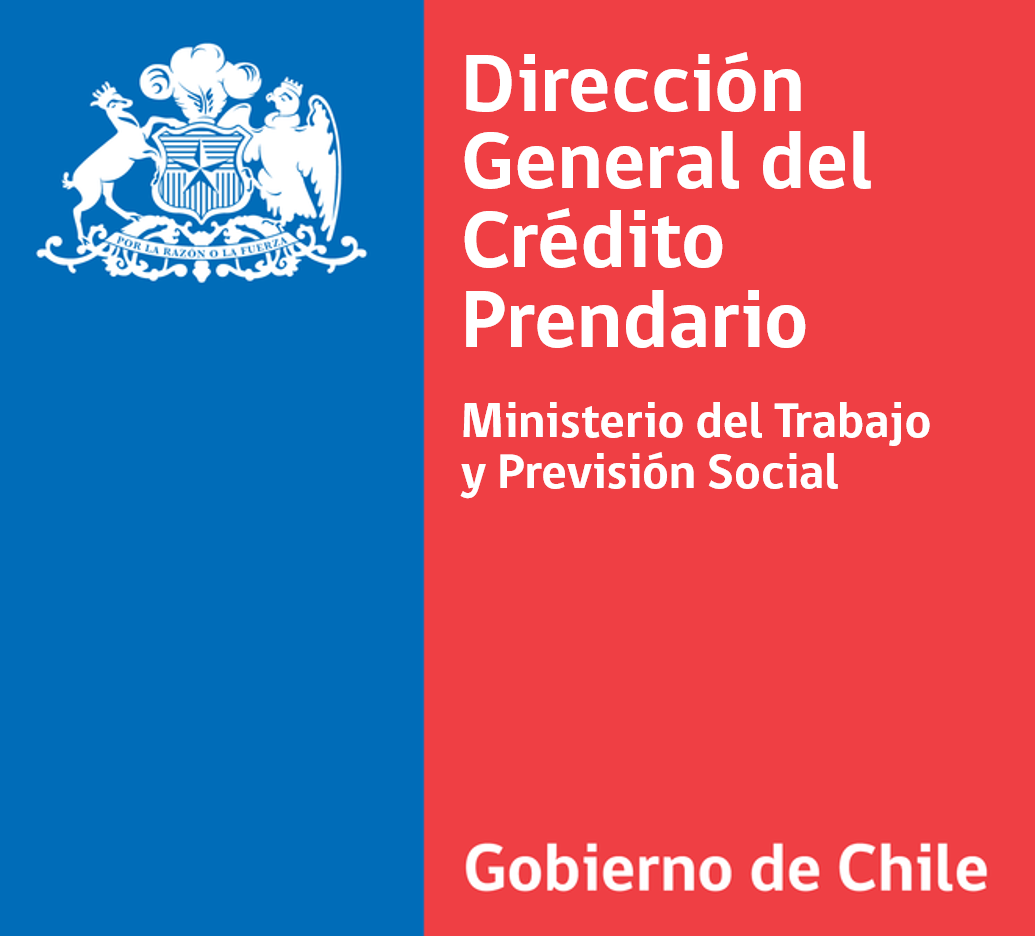 Logo de la Dirección General del Crédito Prendario del Ministerio del trabajo y previsión social.